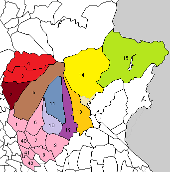 群馬県勢多郡(第二次)